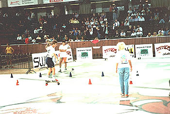 Slalom: Hans Lucas, WK Münster 1987 Foto door vriendin van Hans